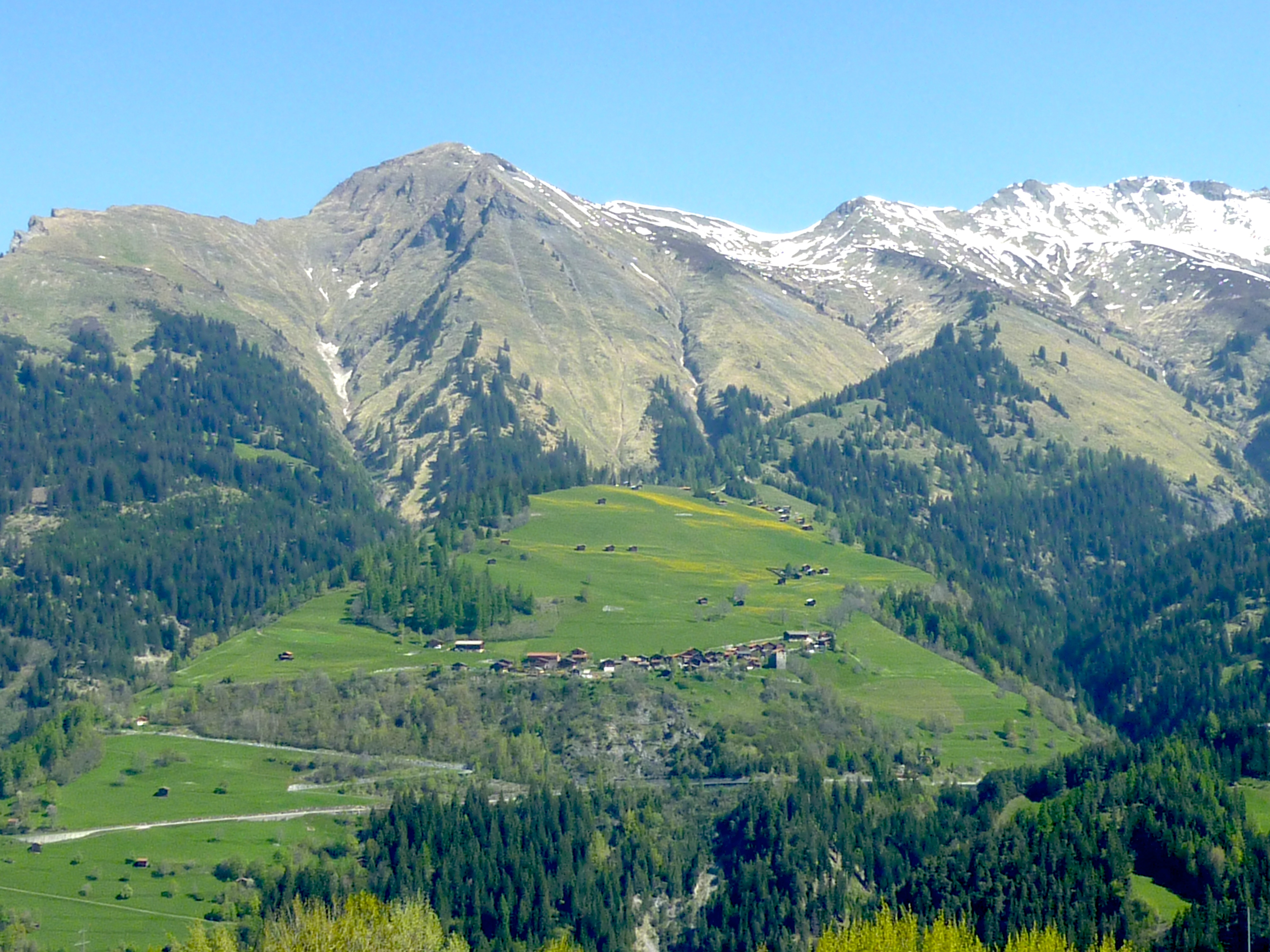 Calreisen